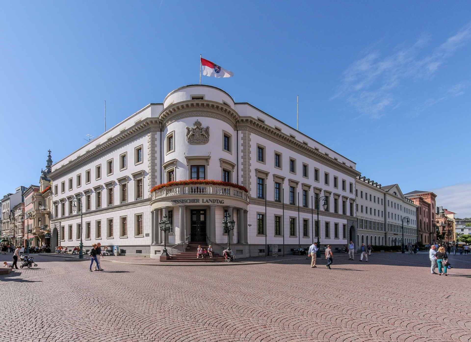 Fassade des Stadtschlosses Wiesbaden, das heute den Hessischen Landtag beherbergt. Auf der rechten Seite schließen sich das Kavaliershaus und der Wilhelmsbau an. Im Vordergrund der Schlossplatz. Auf dem Gebäude die Hessische Landesflagge.This is a photograph of an architectural monument.